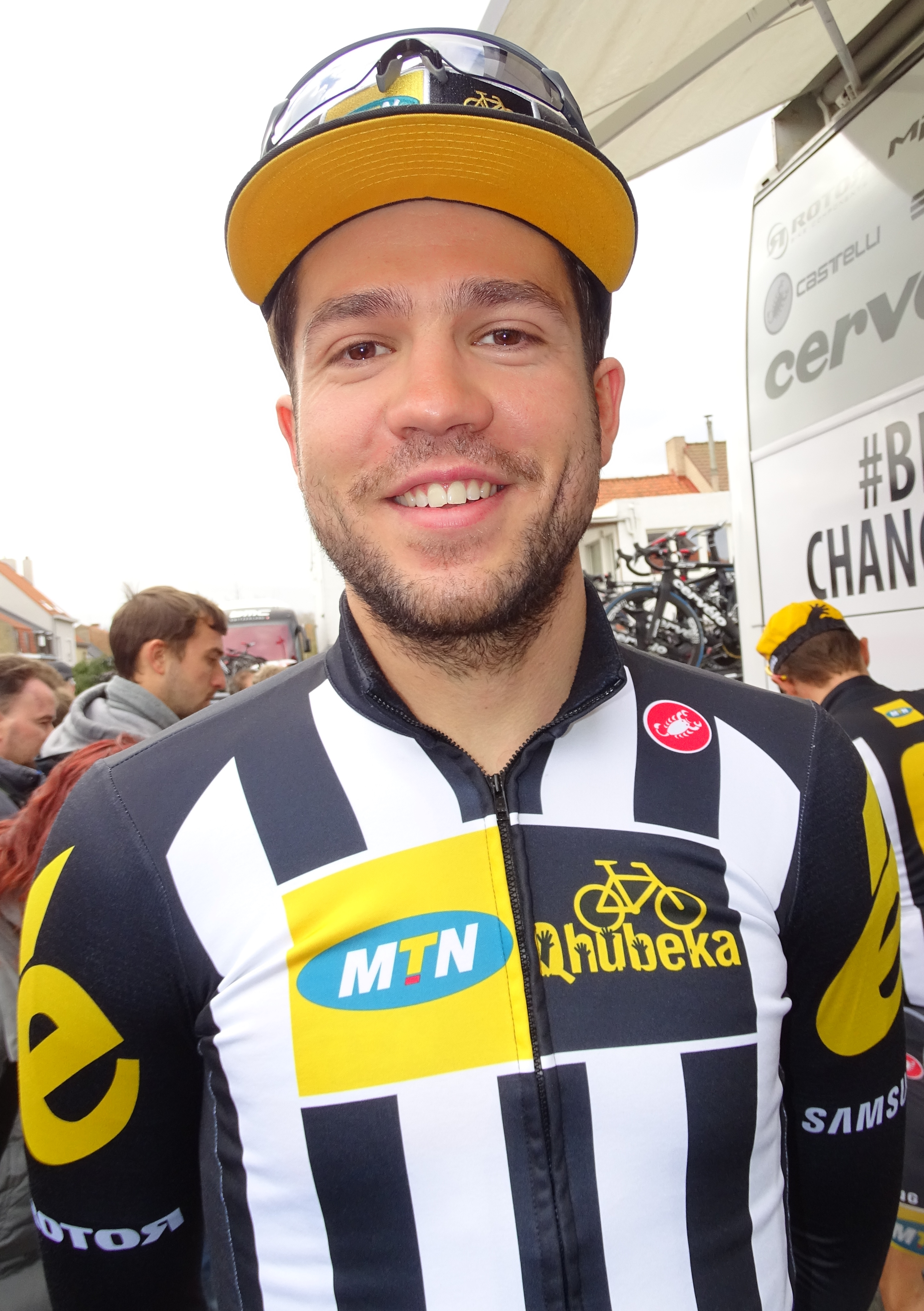 Reportage réalisé le mardi 31 mars à l'occasion de du départ de la première étape des Trois jours de La Panne 2015 à La Panne, Belgique.